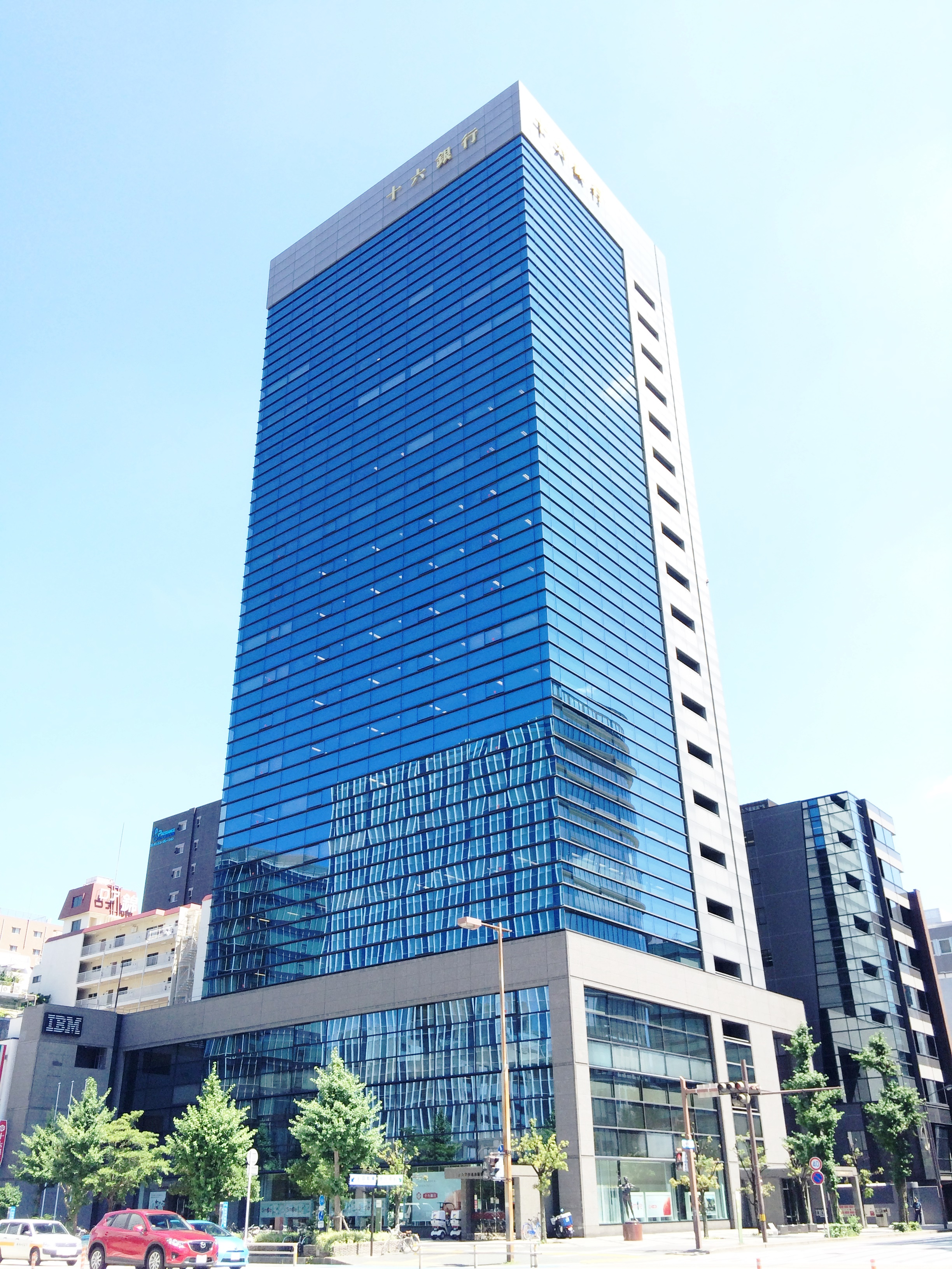 愛知県名古屋市中区錦三丁目1番1号にある十六銀行名古屋ビル。